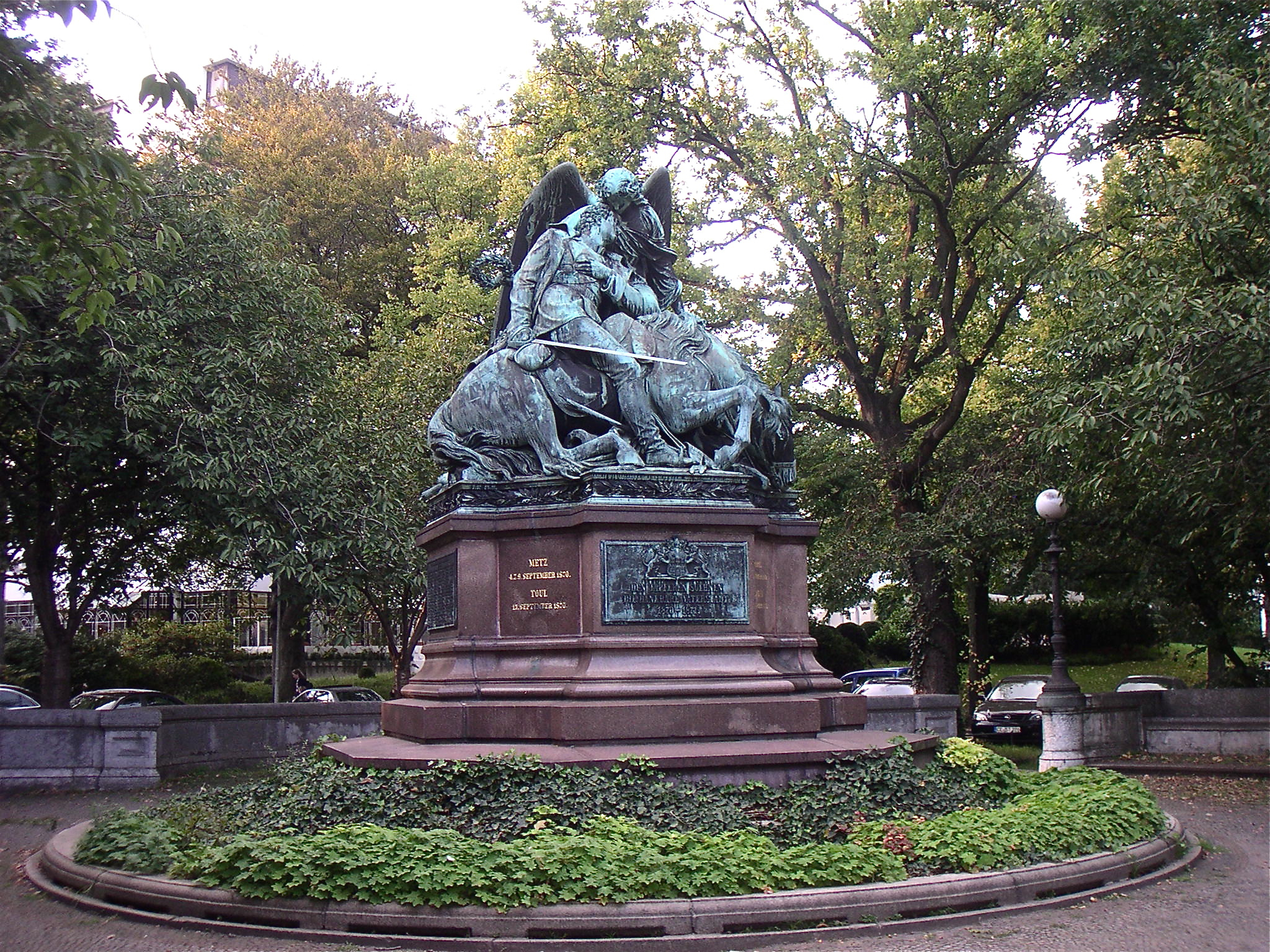 Kriegerdenkmal Fontenay Ecke AlsteruferThis is a photograph of an architectural monument.